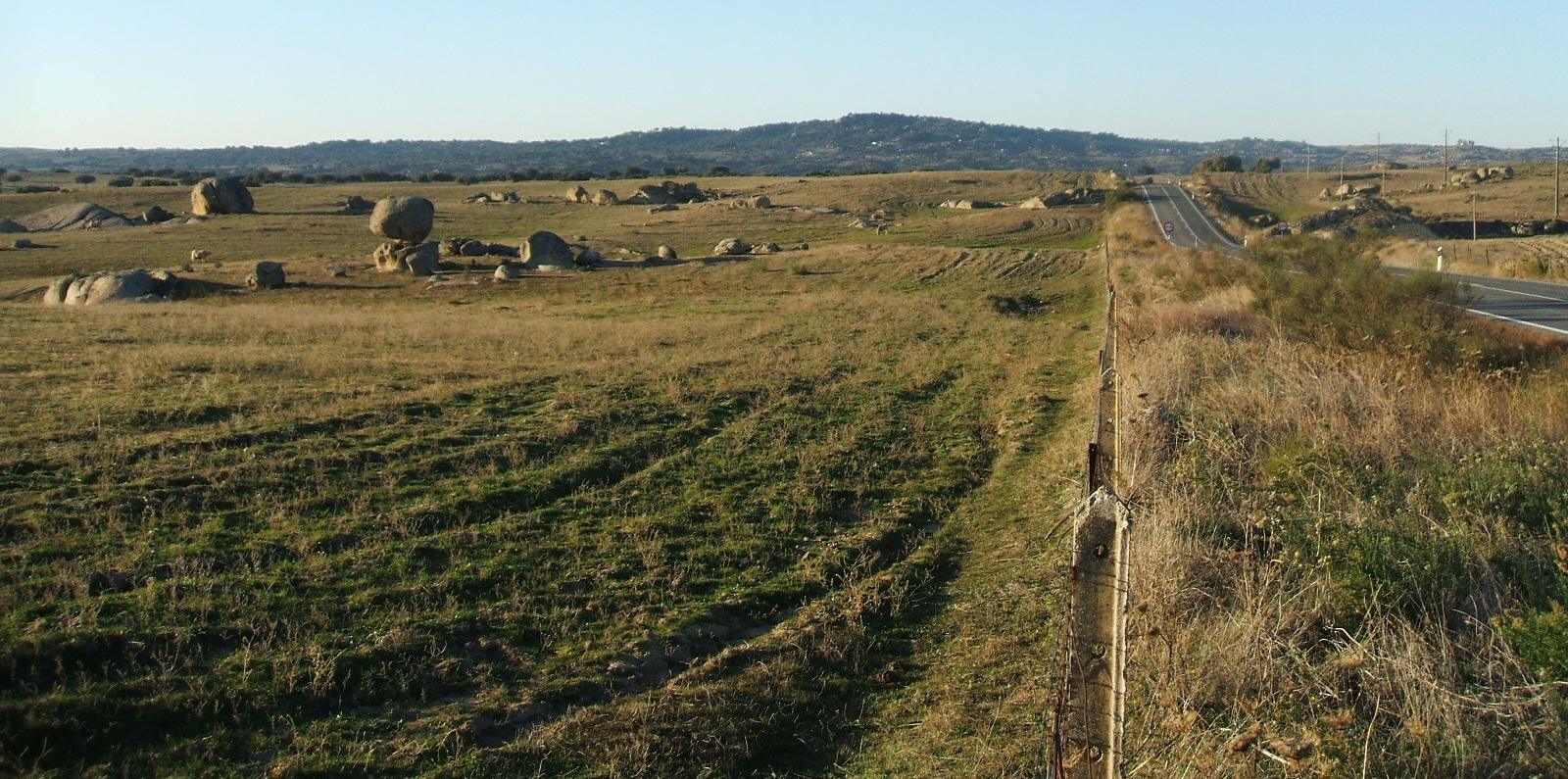 En Navas del Madroño (Cáceres, España) se encuentra la Cabeza de Araya, que es una de las cotas más altas de la penillanura trujillano-cacereña.